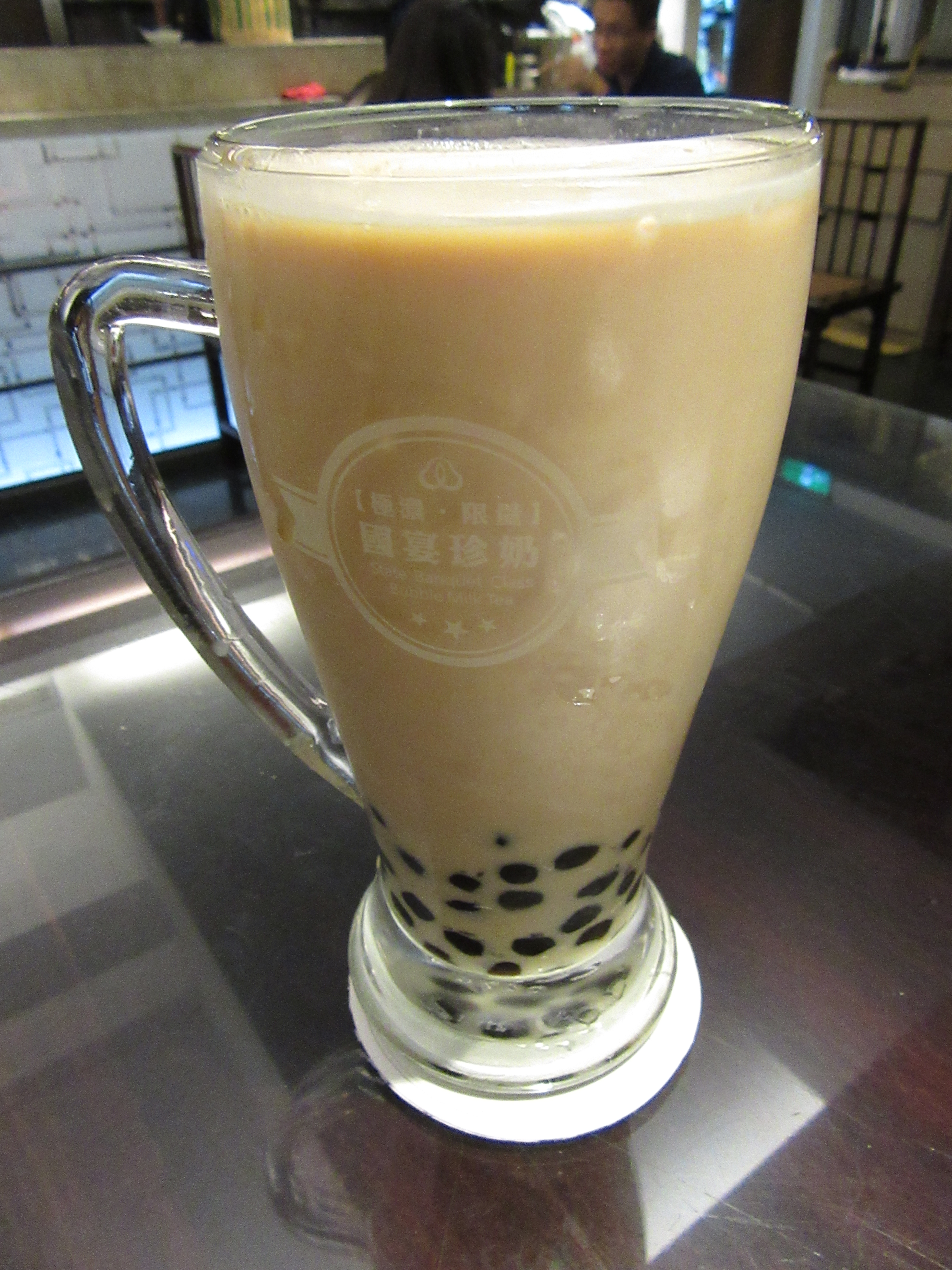 翰林茶館「國宴級珍珠奶茶」，售價是一般市面上珍珠奶茶市價的三倍。